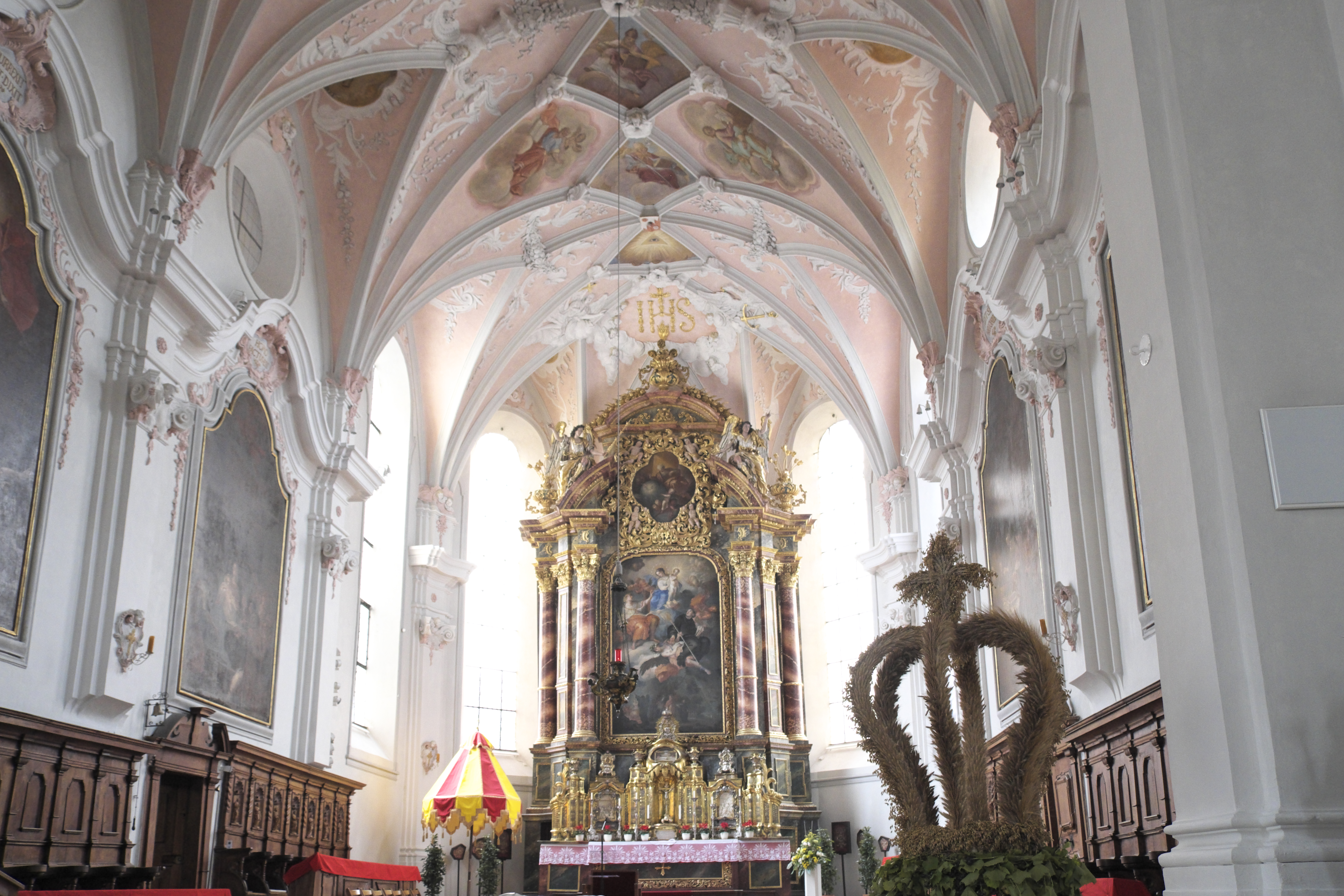 Katholische Pfarrkirche und ehemalige Stiftskirche St. Vitus und St. Deocar in Herrieden im Landkreis Ansbach (Mittelfranken/Bayern), Netzrippengewölbe des Chors, mit Stuckdekor und Deckenmalereien des Ellwanger Hofmalers Johann Edmund Wiedemann von 1748, Hochaltar von 1695